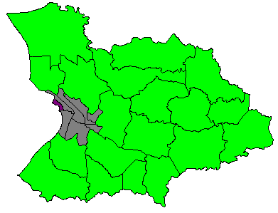 Comunidad El Seco, ubicada en el Barrio Marina Septentrional (Mayagüez Urbano) de Mayagüez, Puerto Rico.